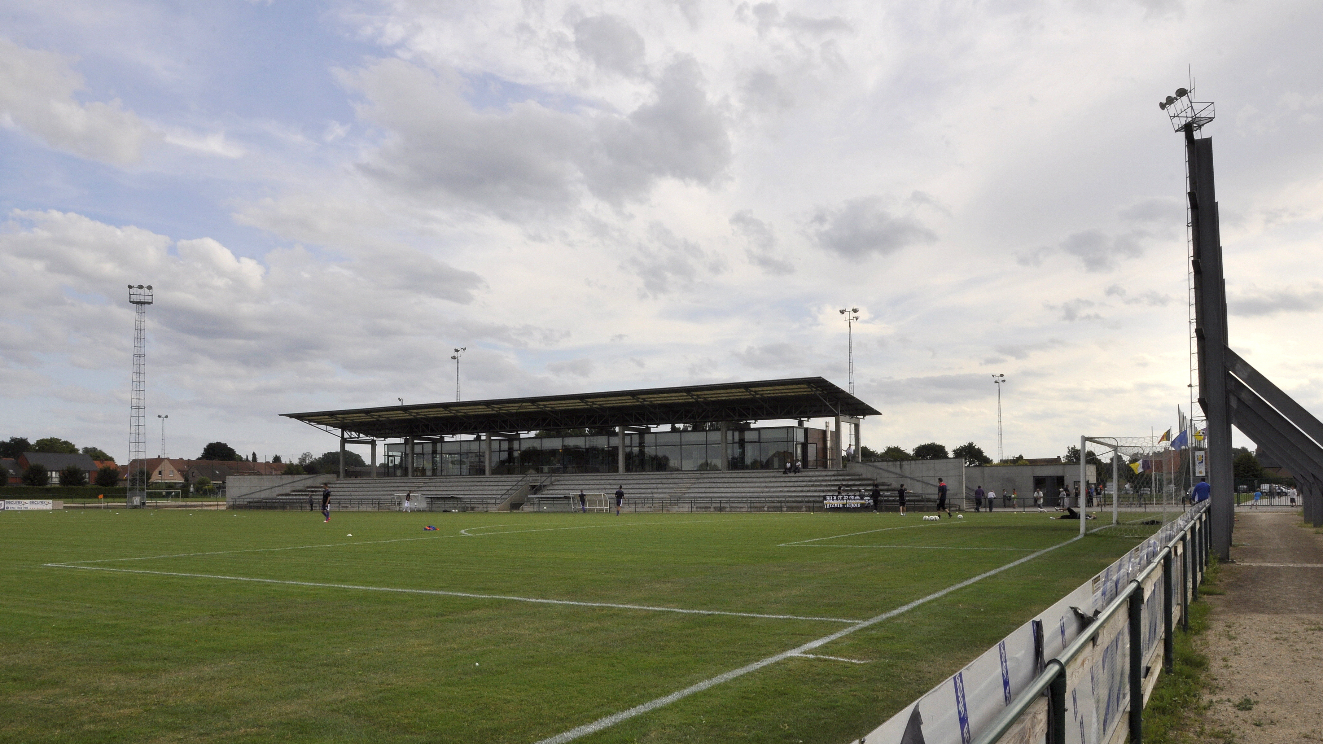 Het voetbalstadion van Géants Athois te Ath, België